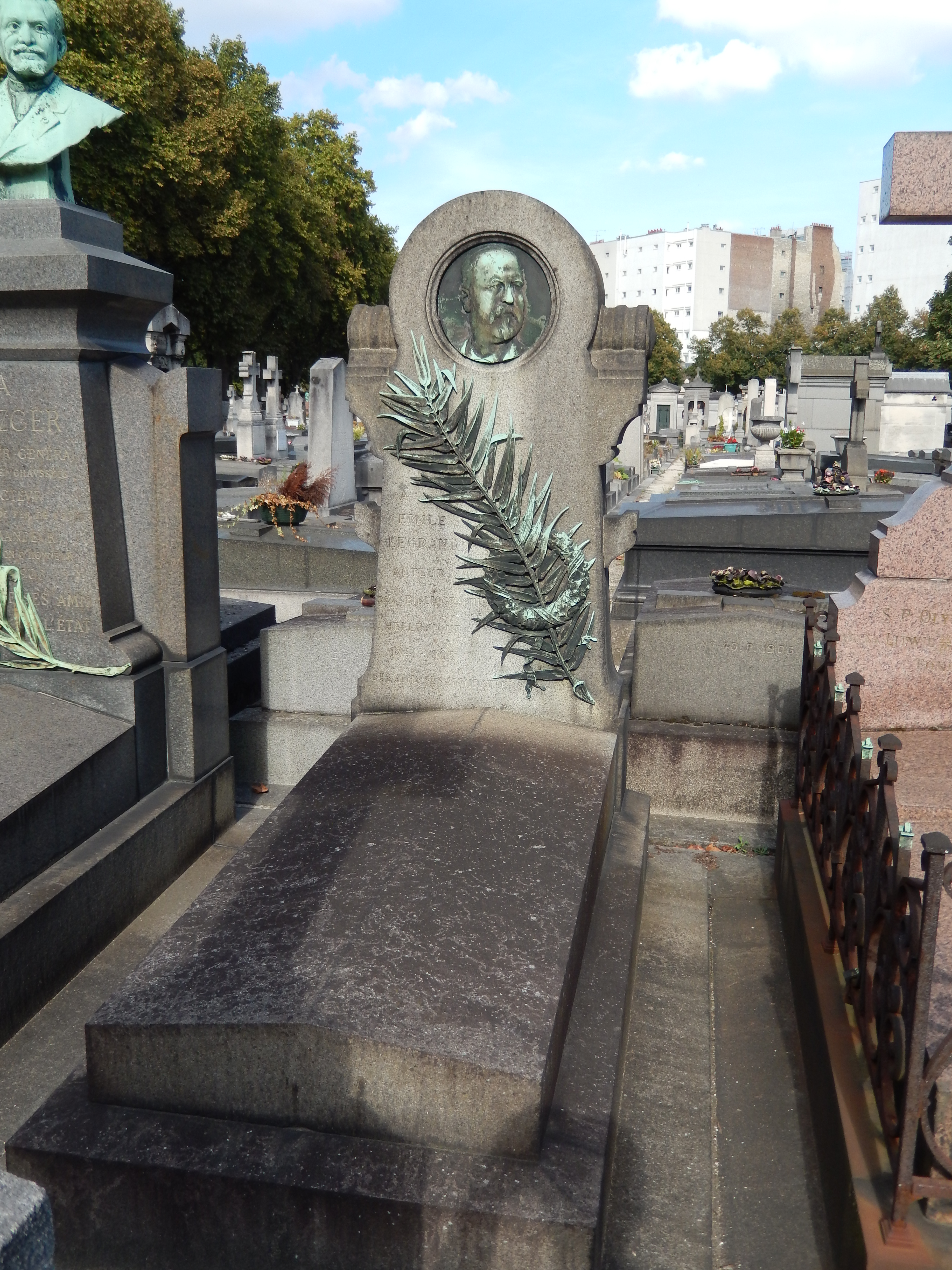 Tombe de Emile Legrand (cimetière du Montparnasse)